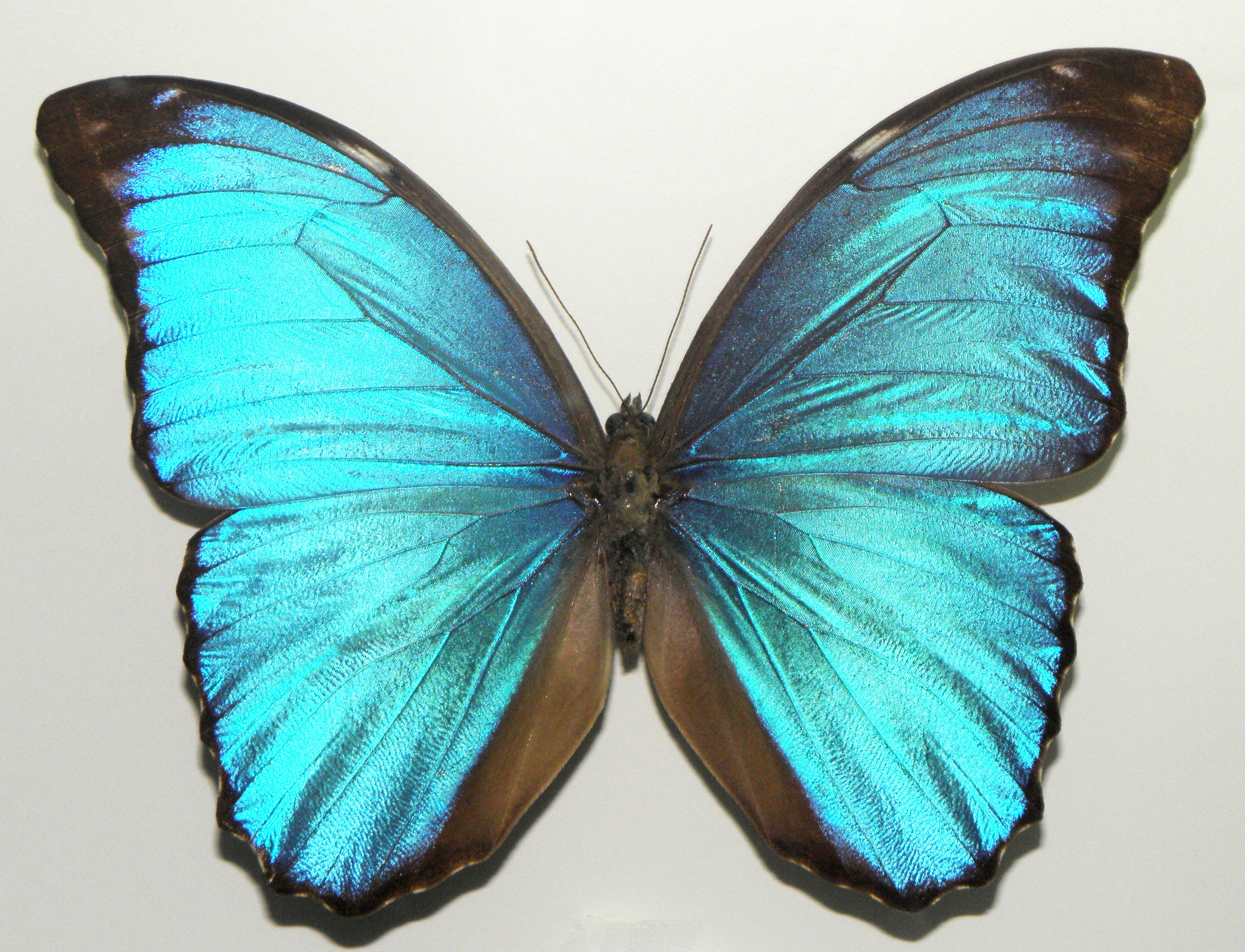 Morpho menelaus coeruleus.